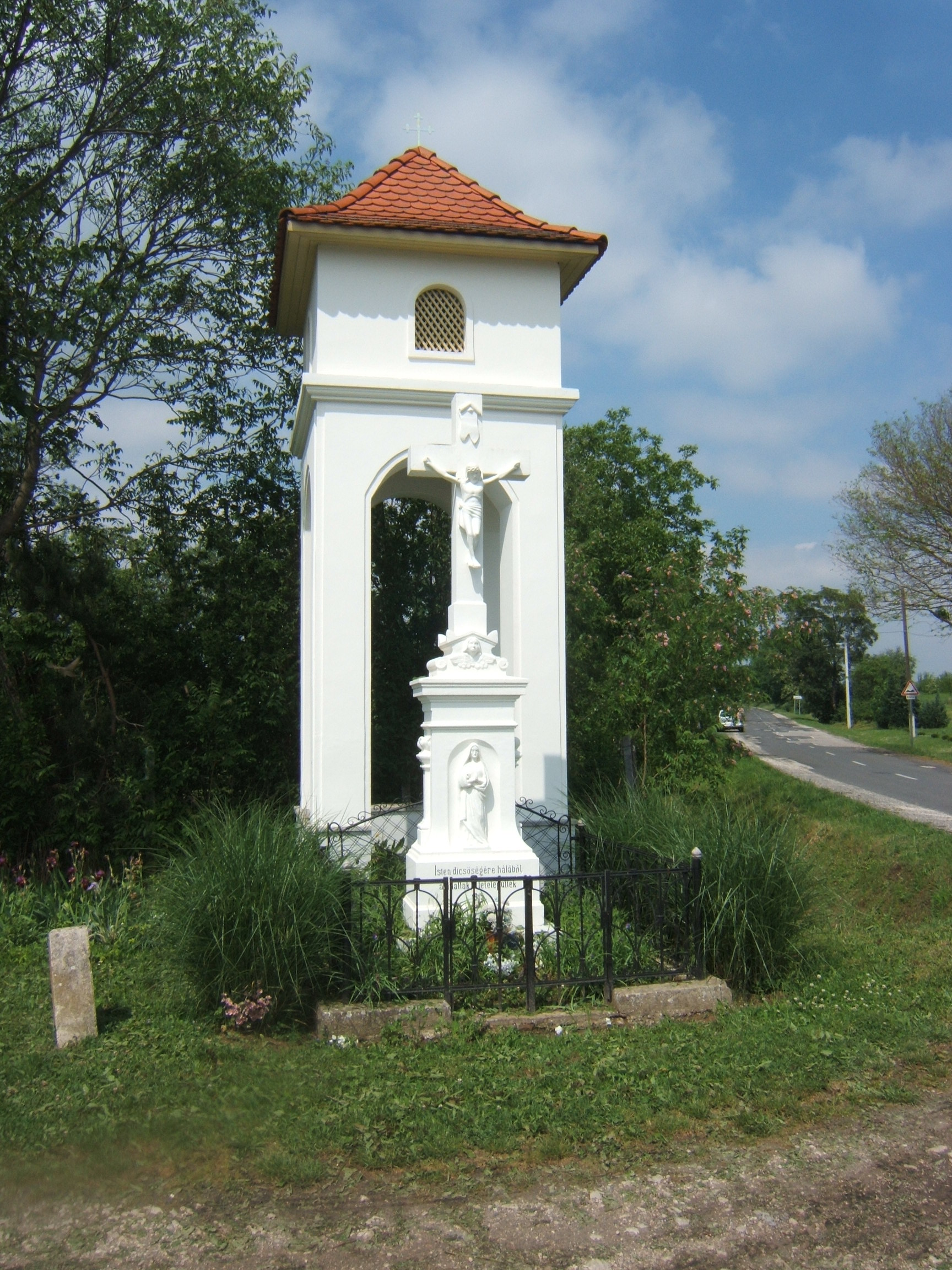 Bodrog, északi harangtorony